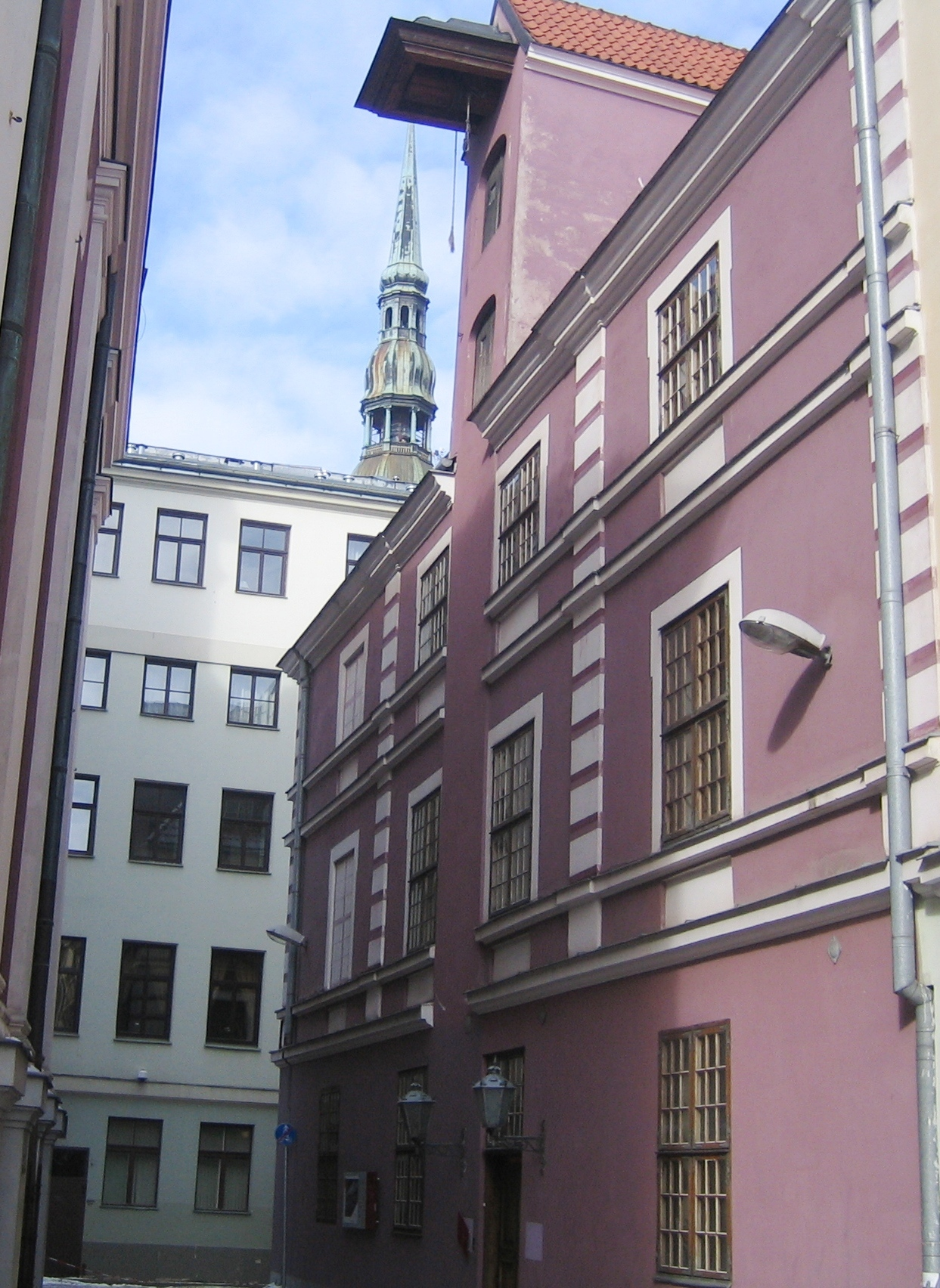 фото здания Латвийского музея фотографии